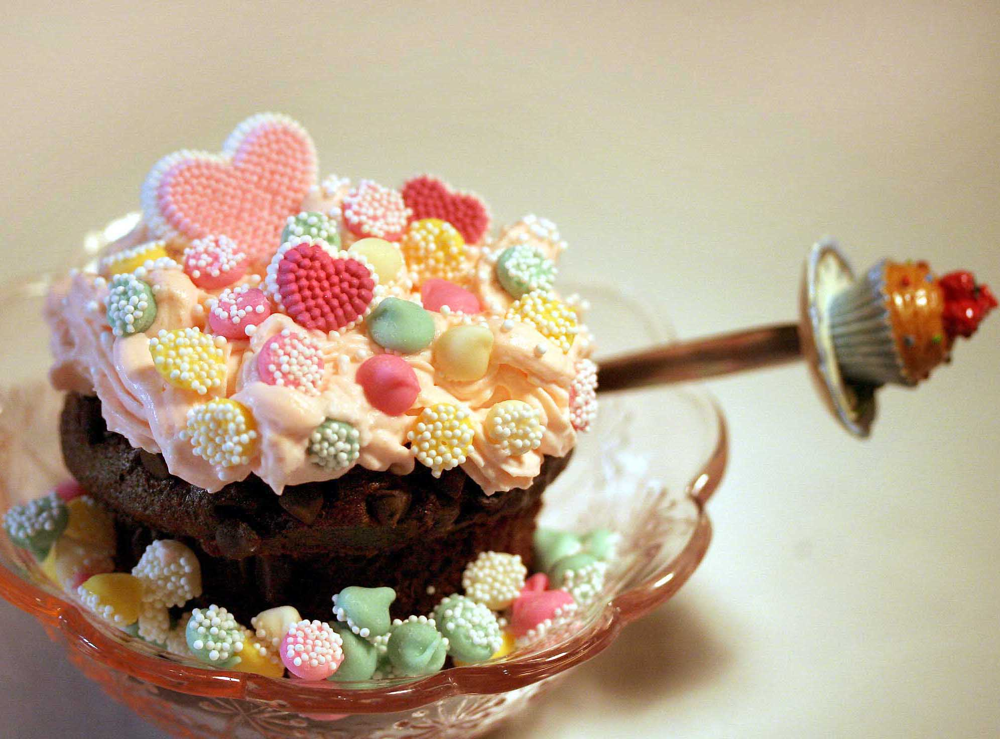 cupcake